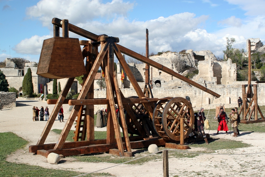 trebuchet chateaux des Baux de Provence